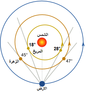 استطالة